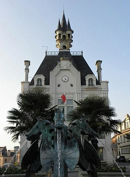 Mairie de Saint-Méen-le-Grand (35).